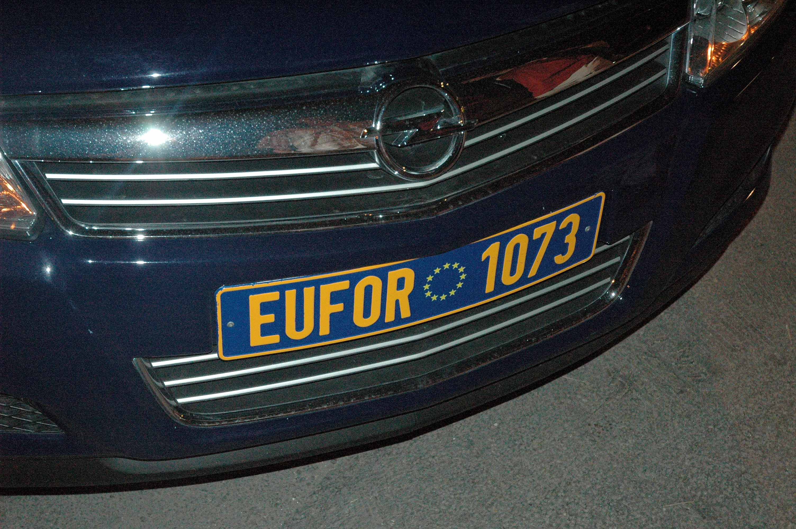 tablica rejestracyjna pojazdu EUFOR w Sarajewie